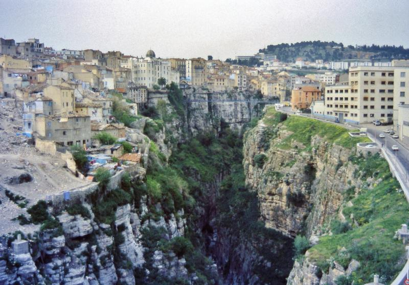 Les gorges, Constantine, Algeria